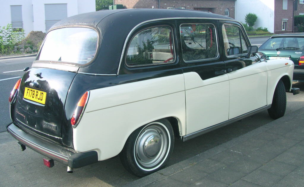 Alsdorf bei Aachen, Austin FX4 (beliebt als Londoner Taxi)